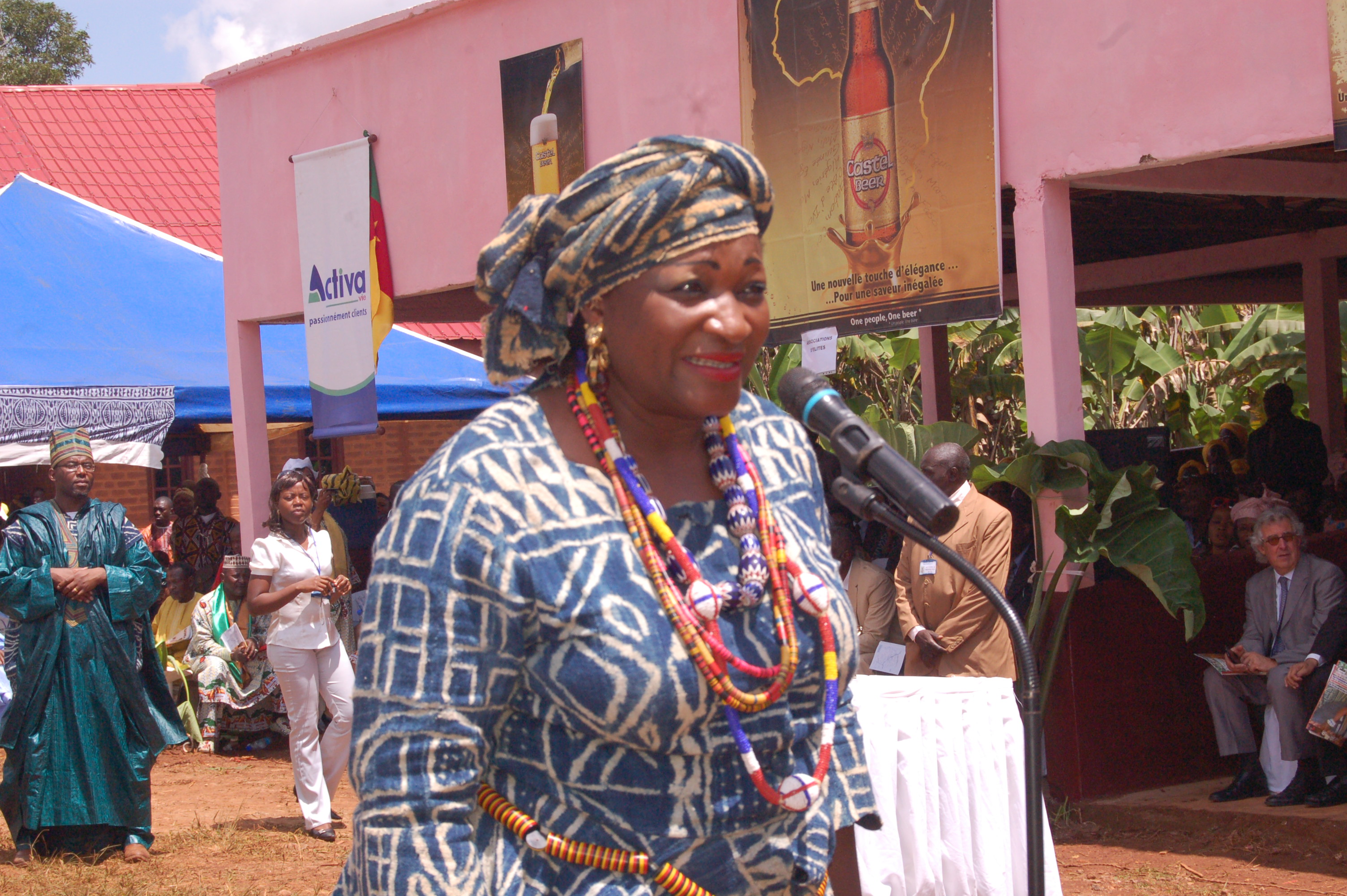 Discours de Mme Celestine Ketcha Courtès lors du festival du Macabo à Bangoua